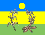 Bandera del municipio Pedro Gual. Estado Miranda. Venezuela